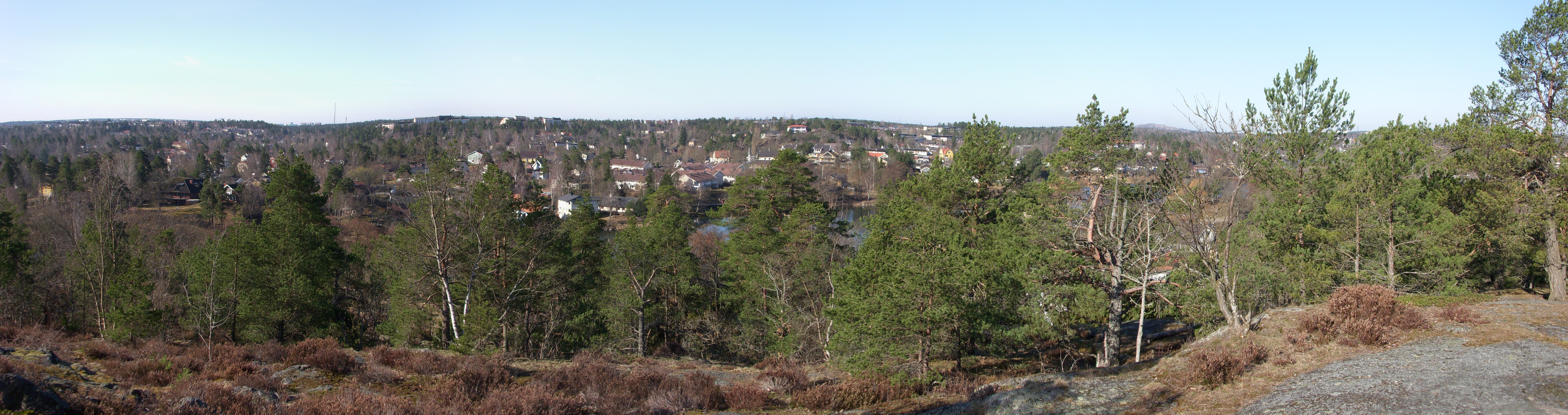 Vy från Långsjöhöjden i Stockholm mot sydväst och Huddinge kommun